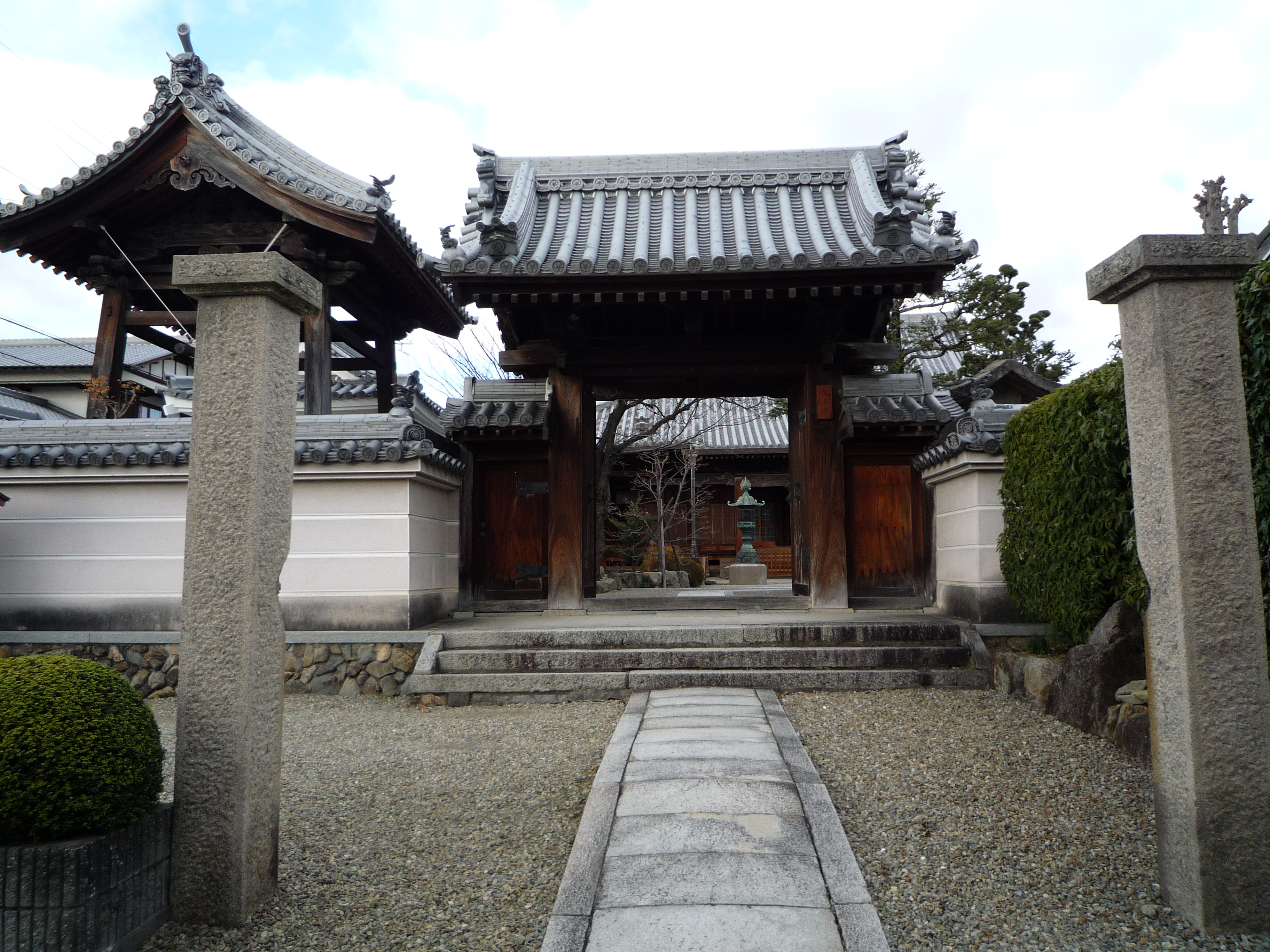 報恩寺（大阪府豊中市）の山門